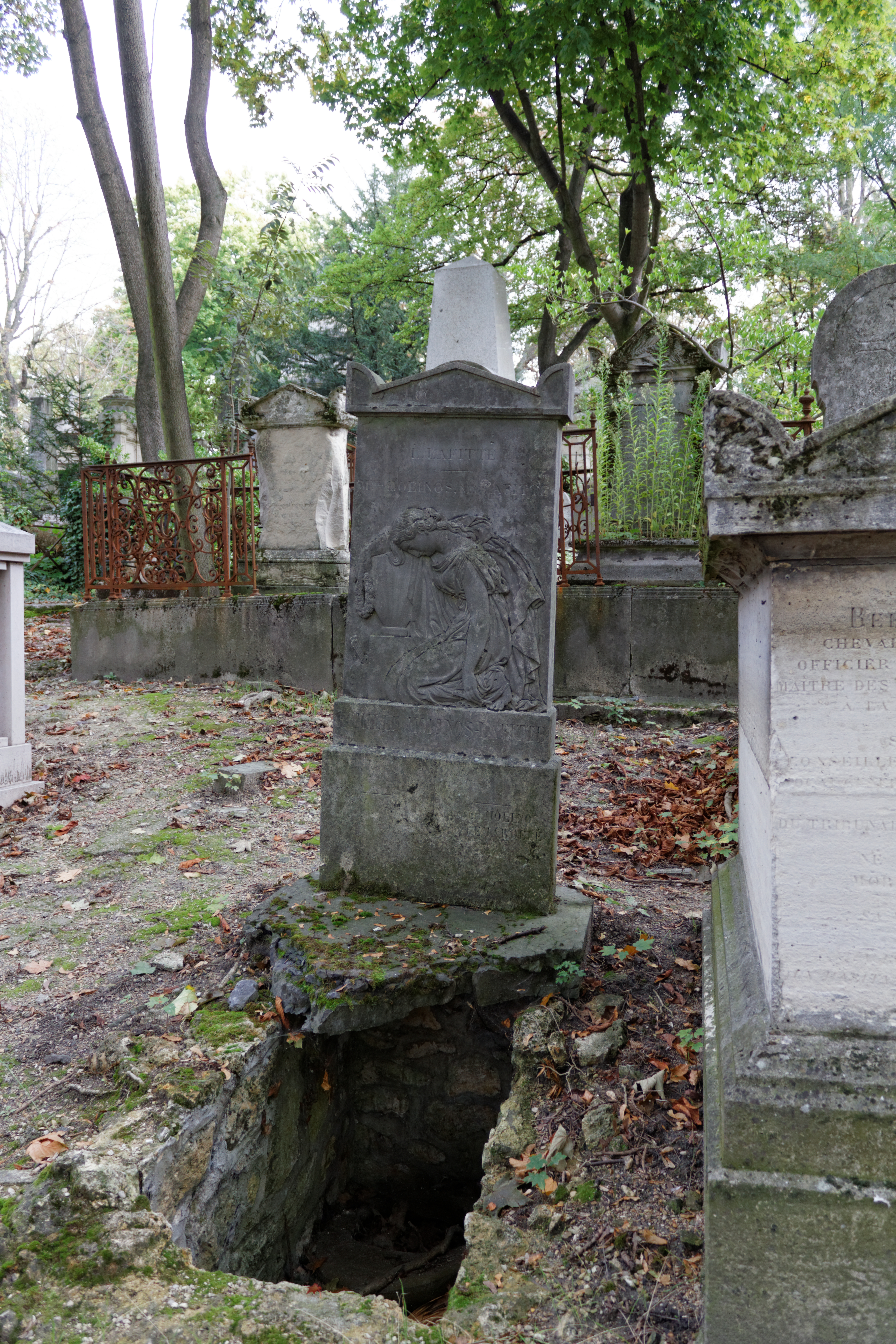 Stèle ornée d'un bas-relief en bronze signé J. J. Feuchère, 1829. Bas-relief La Douleur représentée par une femme affaissée sur une urne funéraire. Elle tient dans sa main droite une couronne. Une palette et des pinceaux, attributs du peintre, sont déposés près de l'urne.